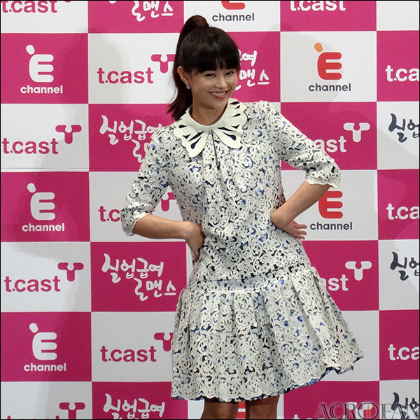 E채널 드라마 '실업급여 로맨스' 제작발표회